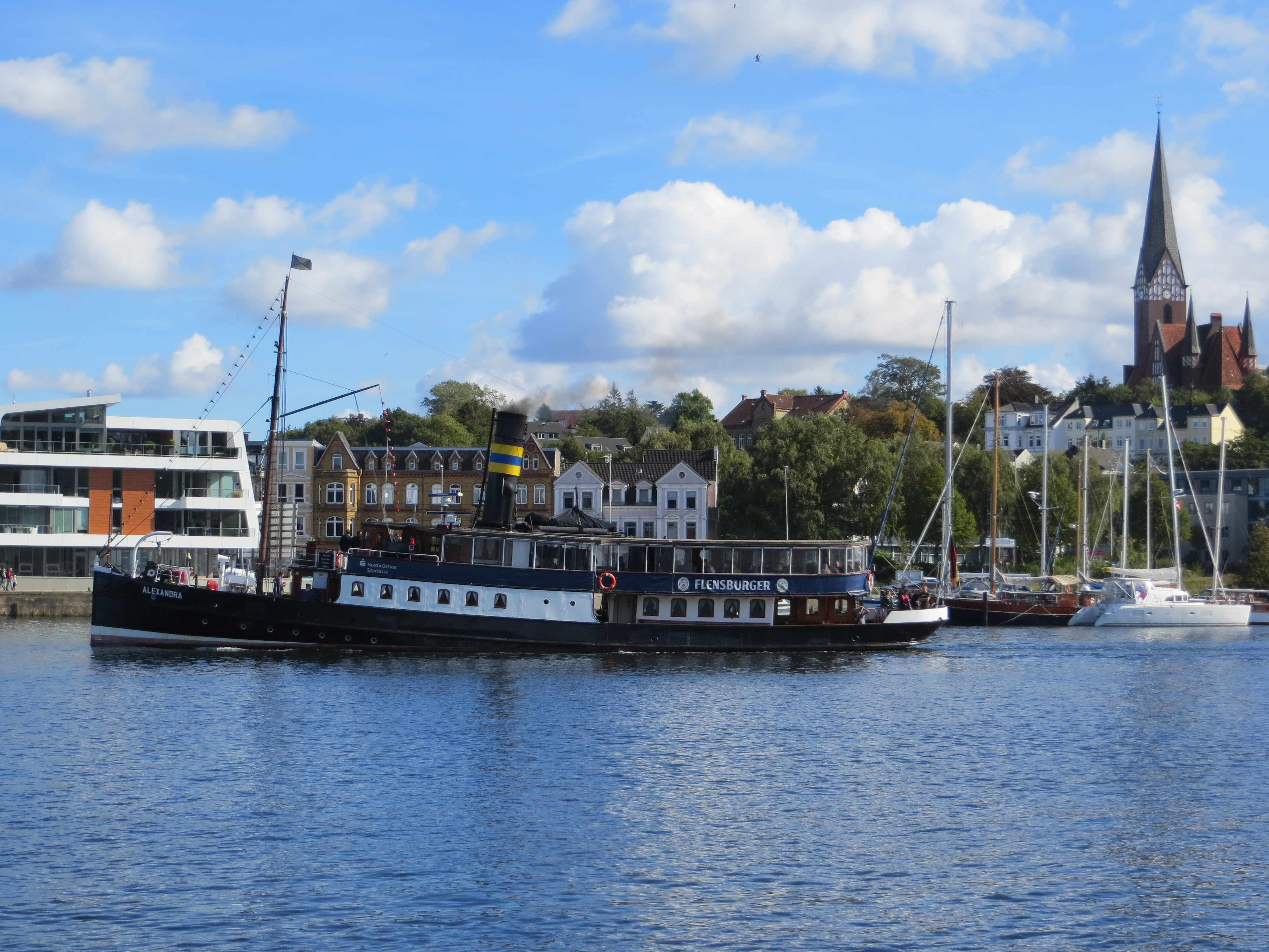 Alexandra-Dampfer mit St. Jürgen-Kirche (Flensburg)